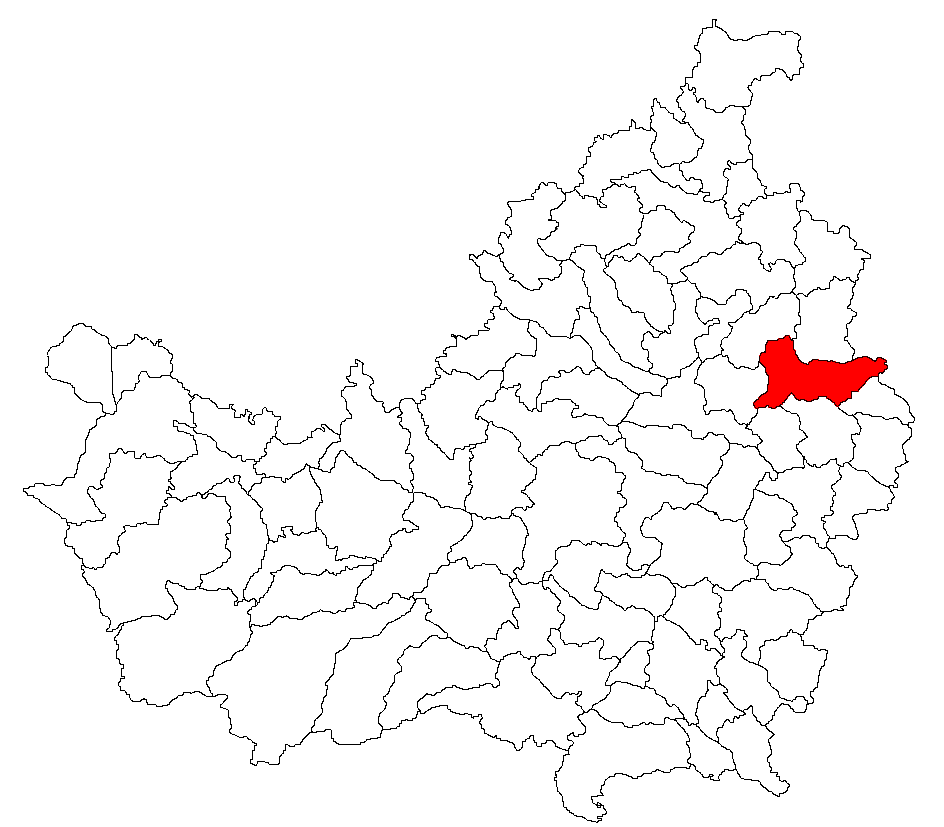 Categorie:Hărţi ale judeţului Cluj